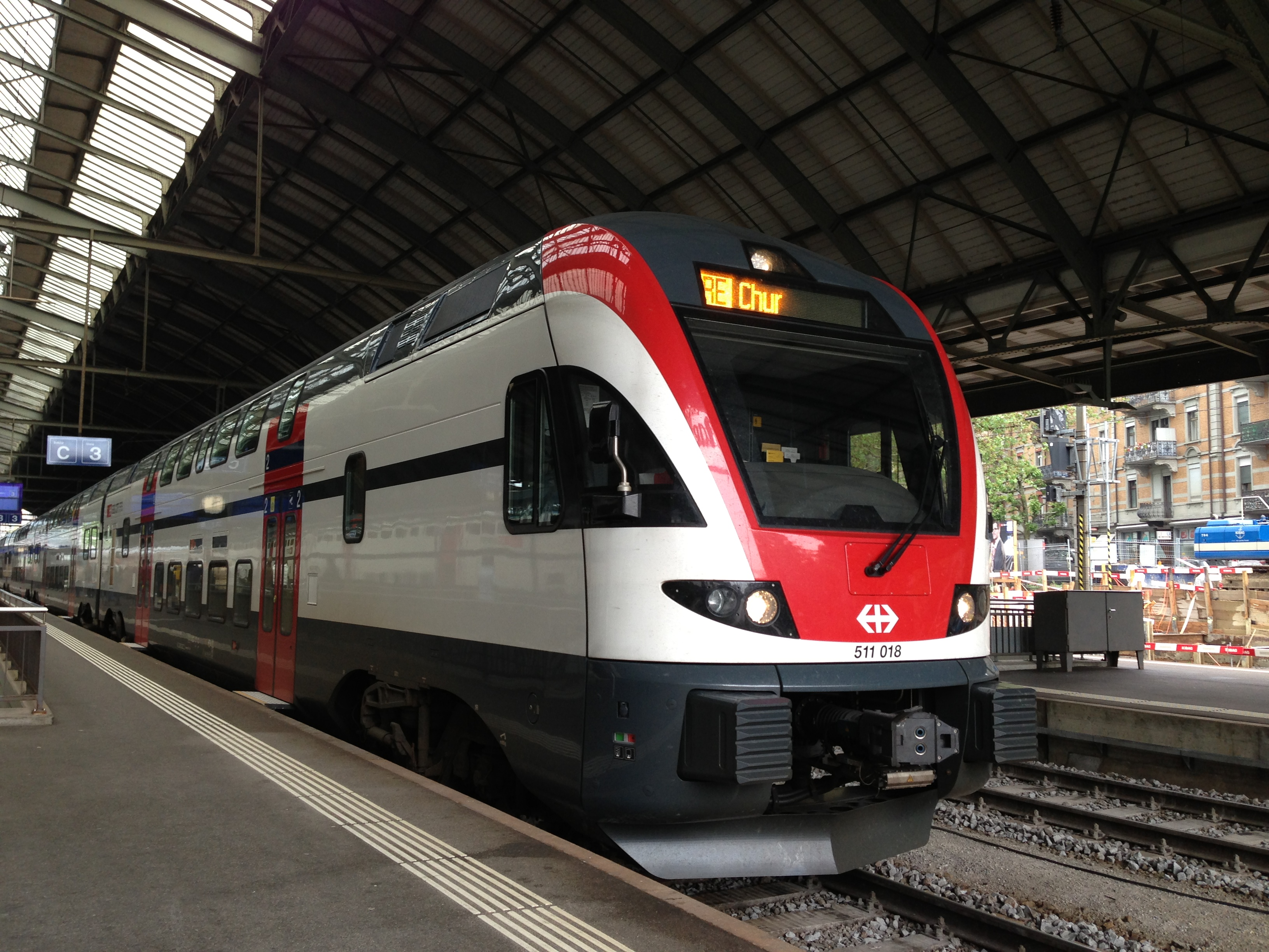 Der neue REX (Typ RABe 511) in St. Gallen, abfahrbereit nach Chur.